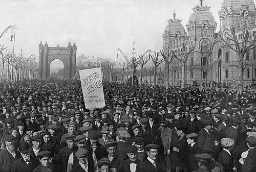 Imatge de la protesta que va tenir lloc a Barcelona durant el Tancament de Caixes